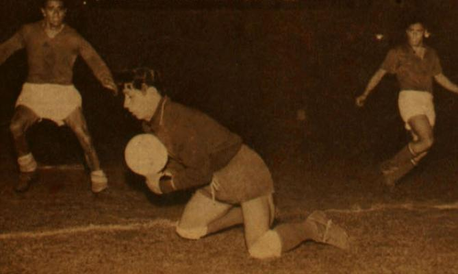 Instante del partido entre Audax y Wanderers 1957